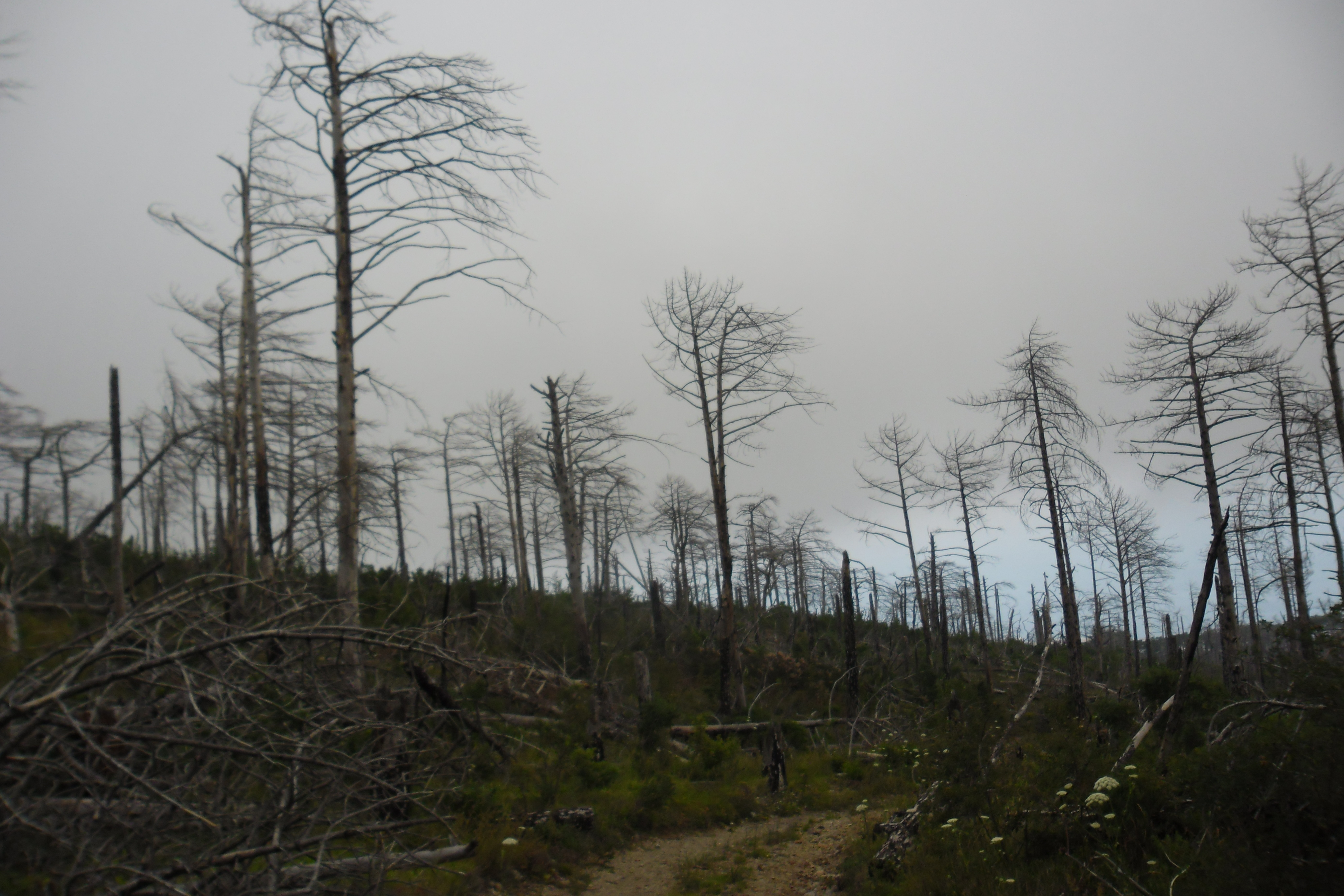 Фото